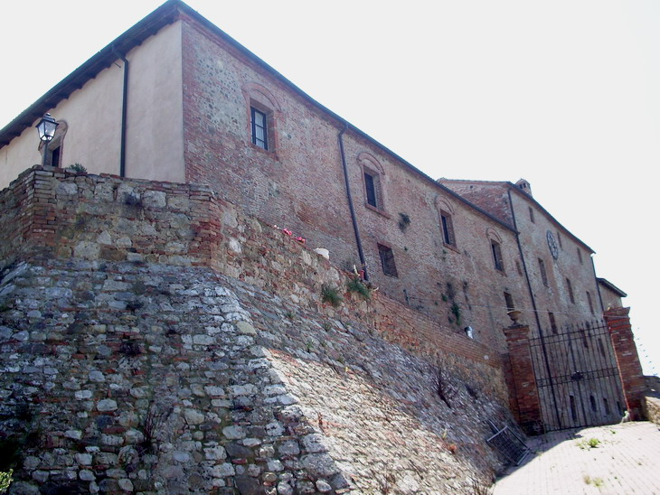 Facciata meridionale esterna del Castello di Monte Antico (GR)